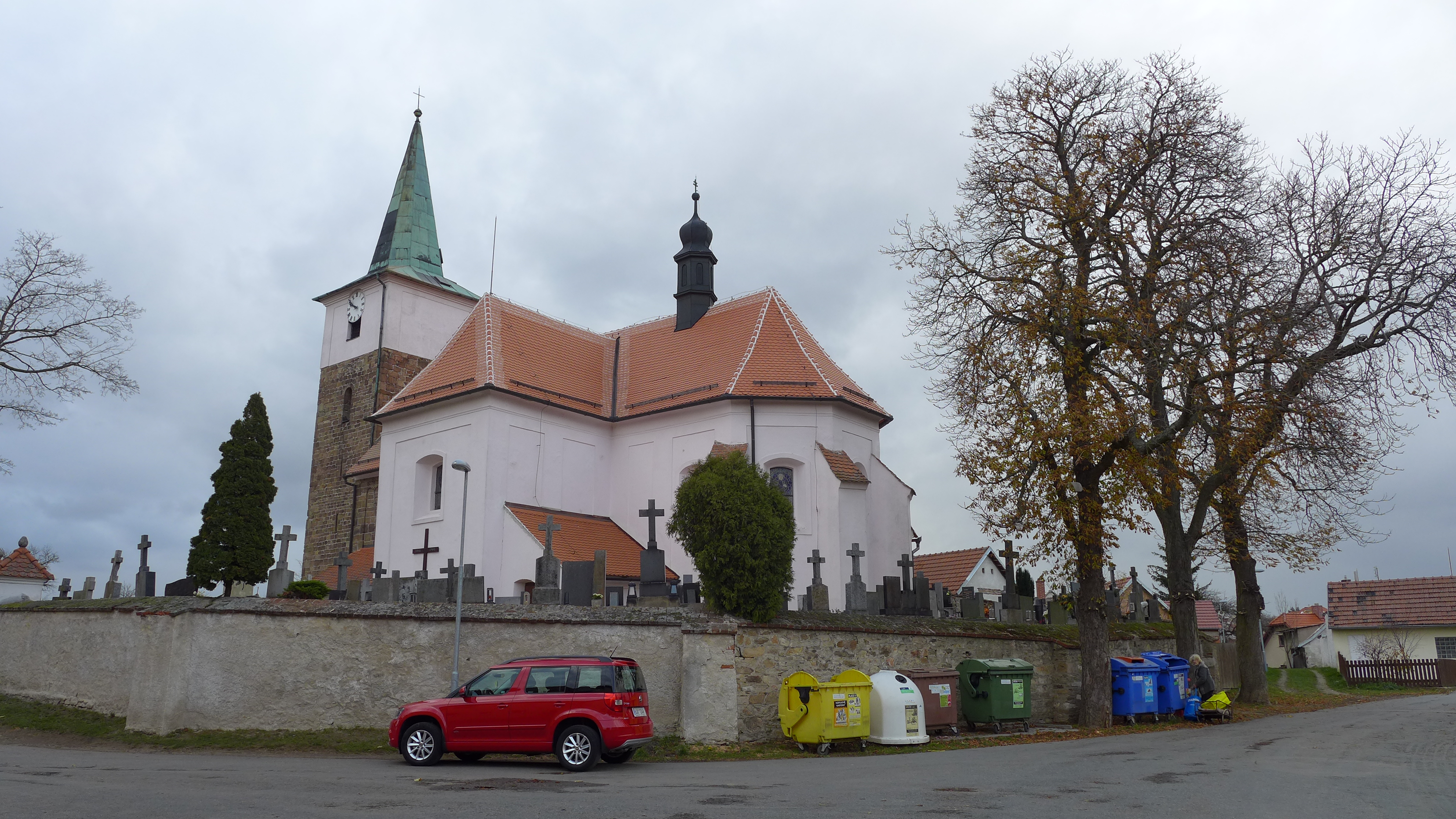 Kostel Nanebevzetí Panny Marie, v obci, na východní straně, Březník.